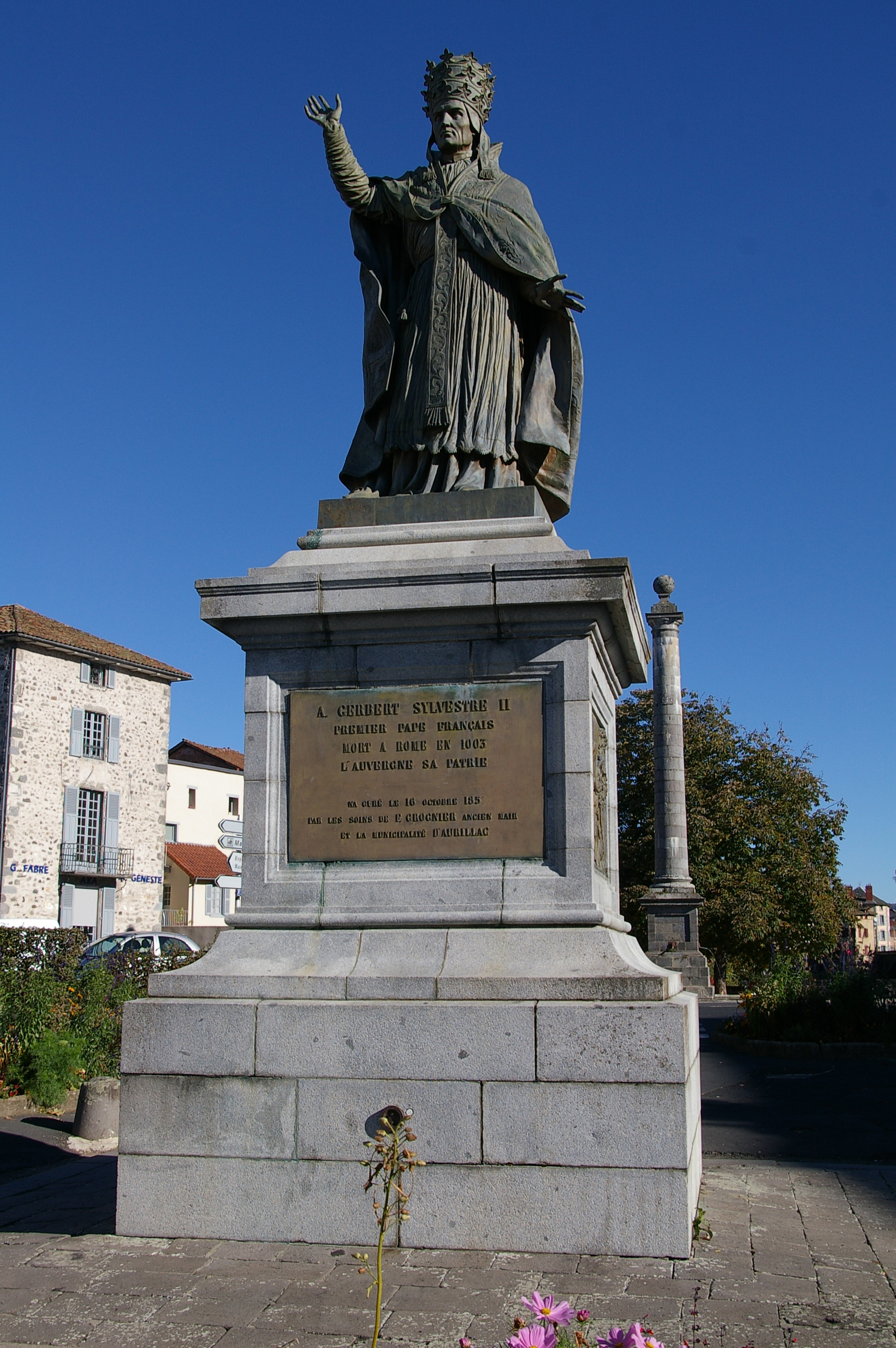 Statue du pape Gerbert appelé "Sylvestre II"